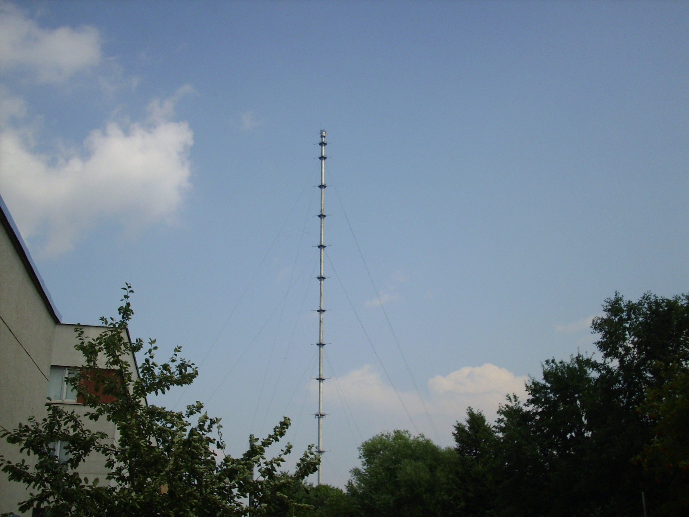 Метеомачта Федорова